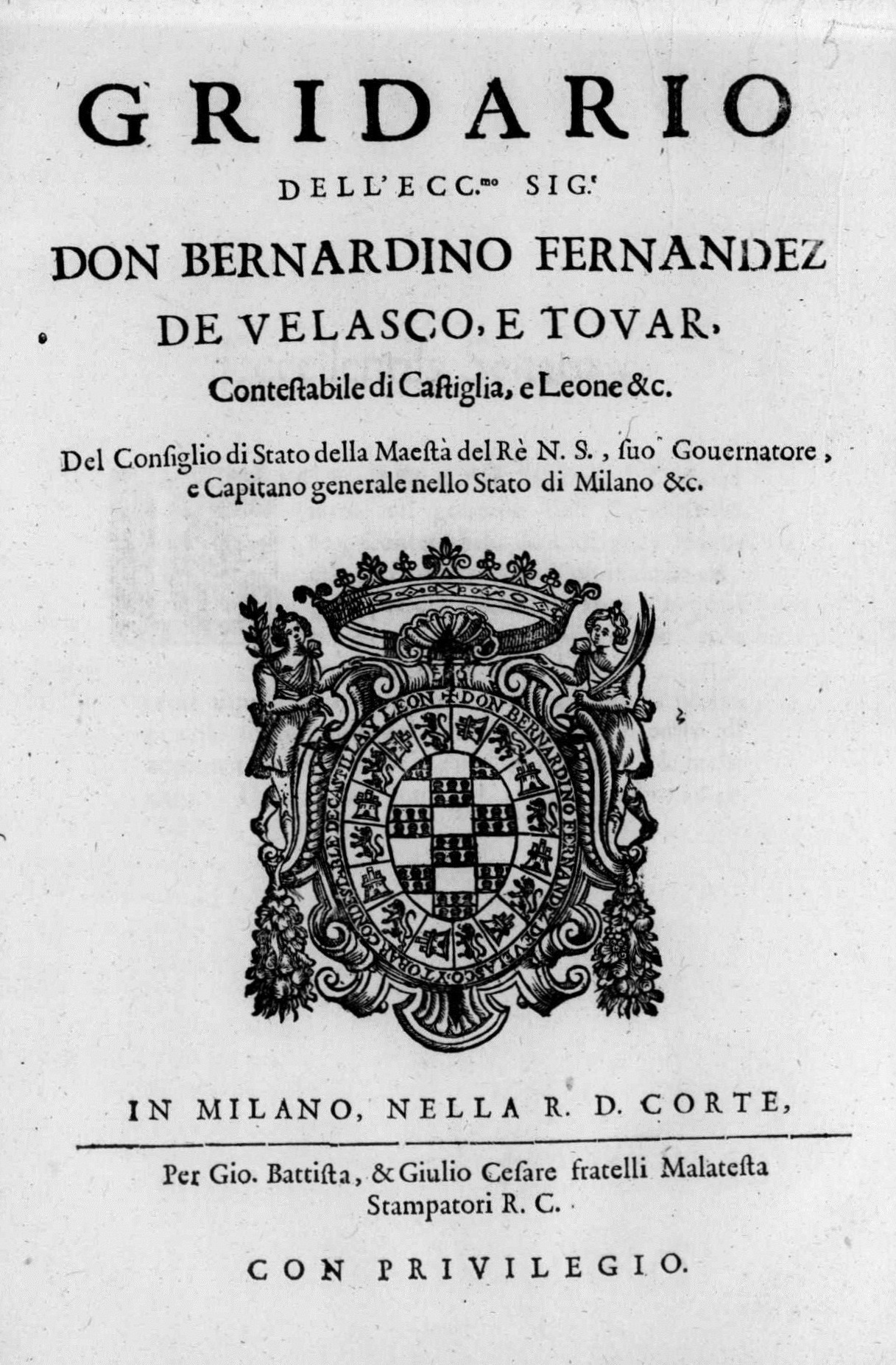 Frontespizio